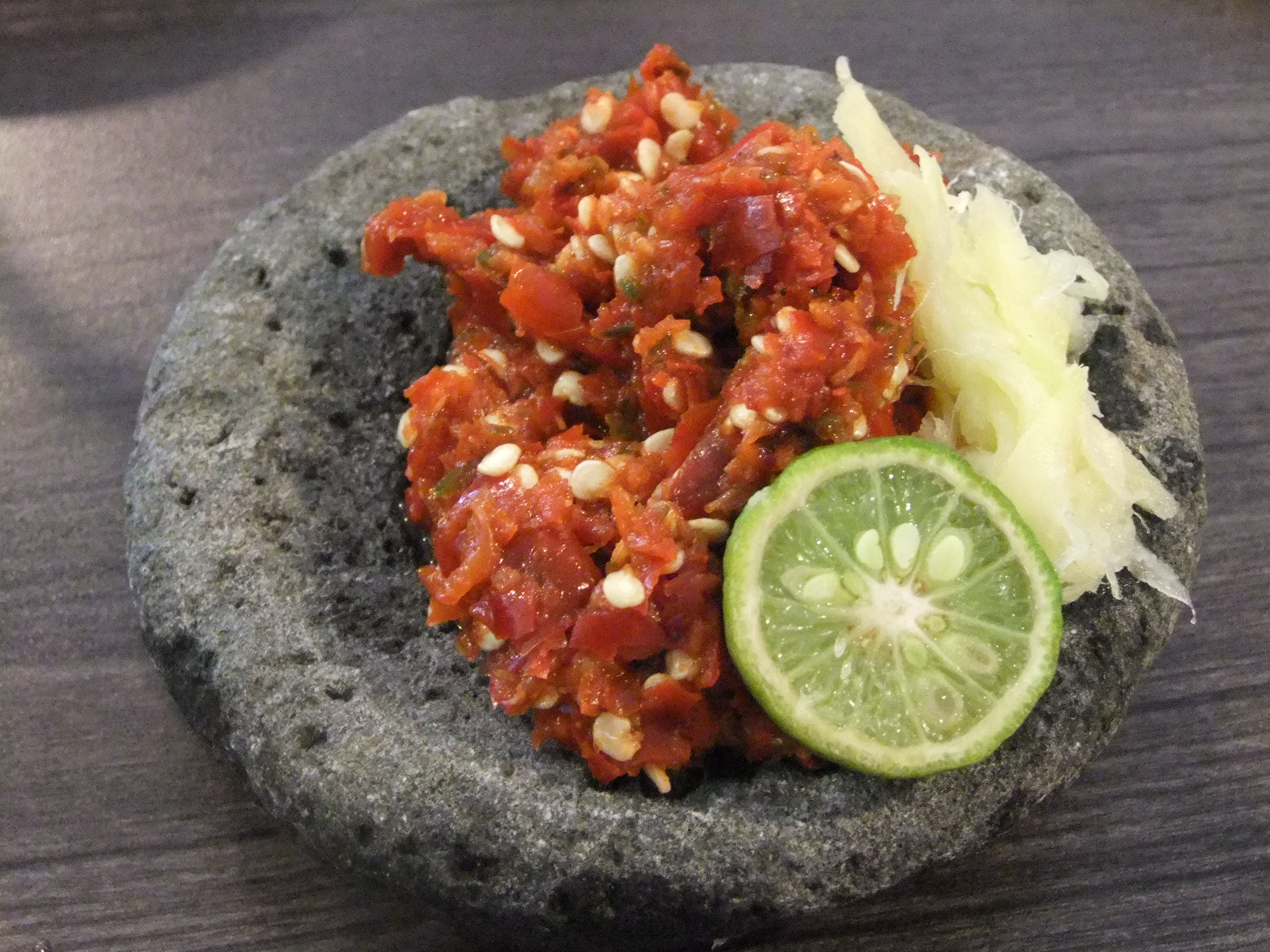 Sambal untuk ikan bakar